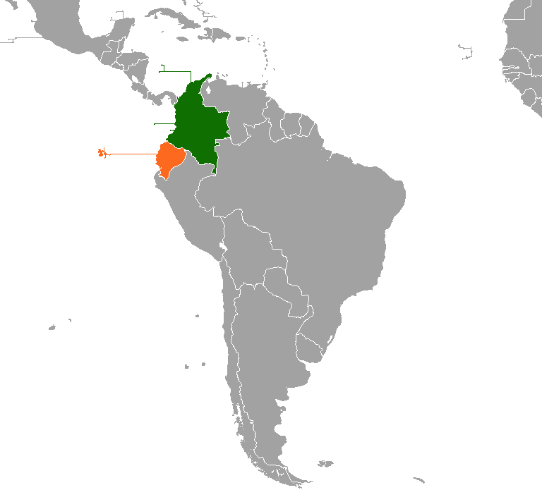 Colombia and Ecuador location map